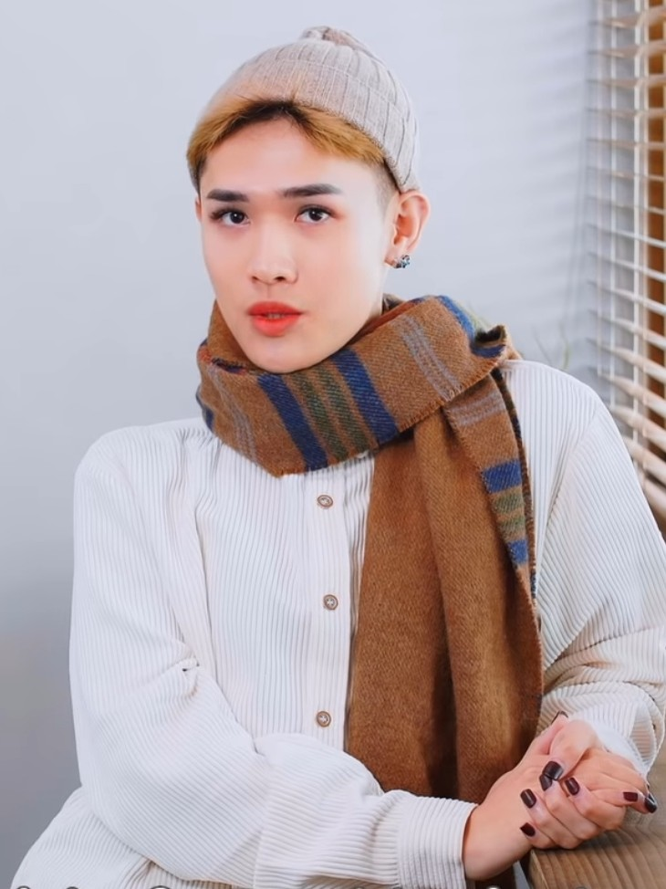 台灣YouTuber鍾明軒